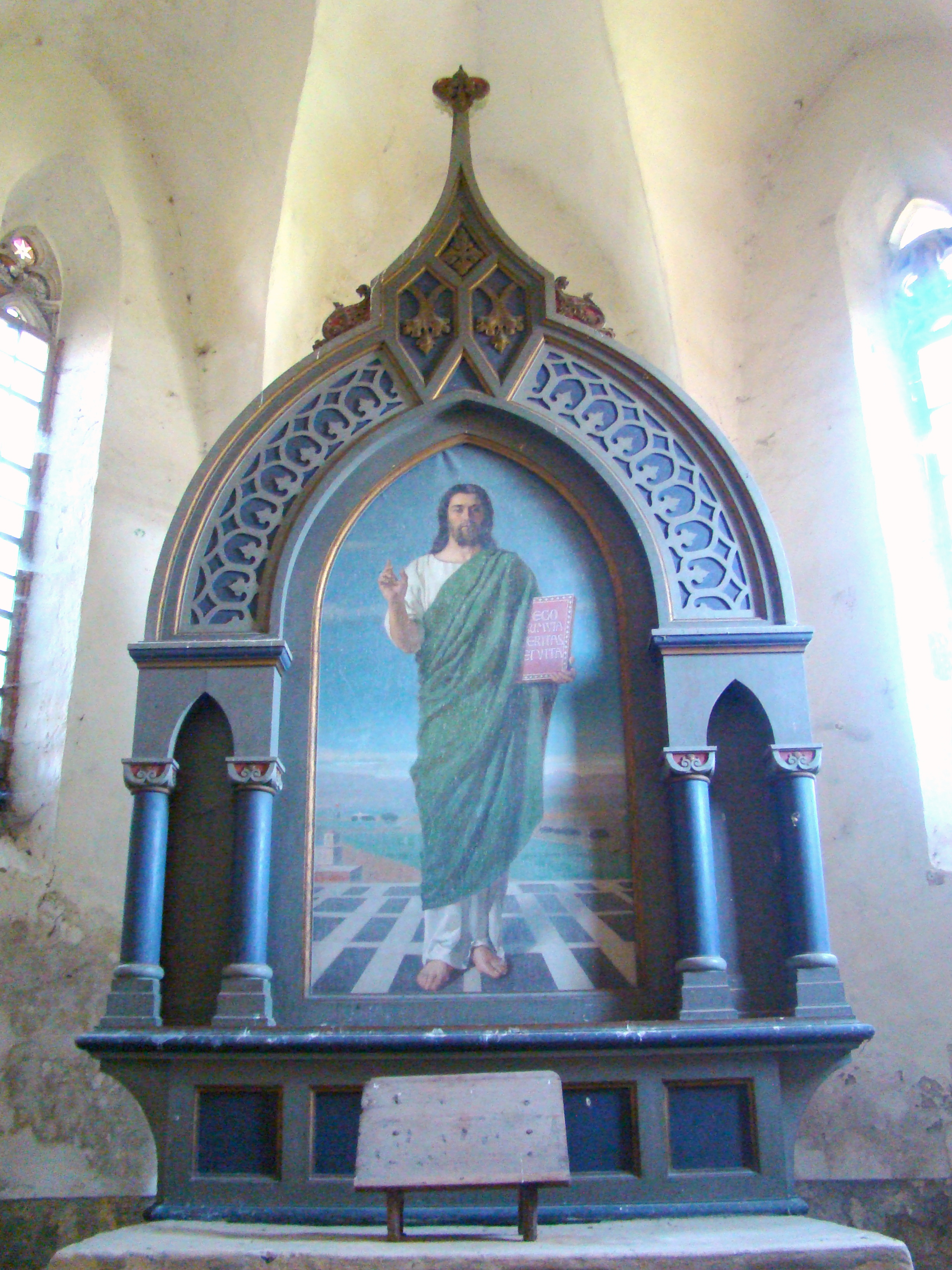 Biserica evanghelică, sat Șmig; comuna Alma